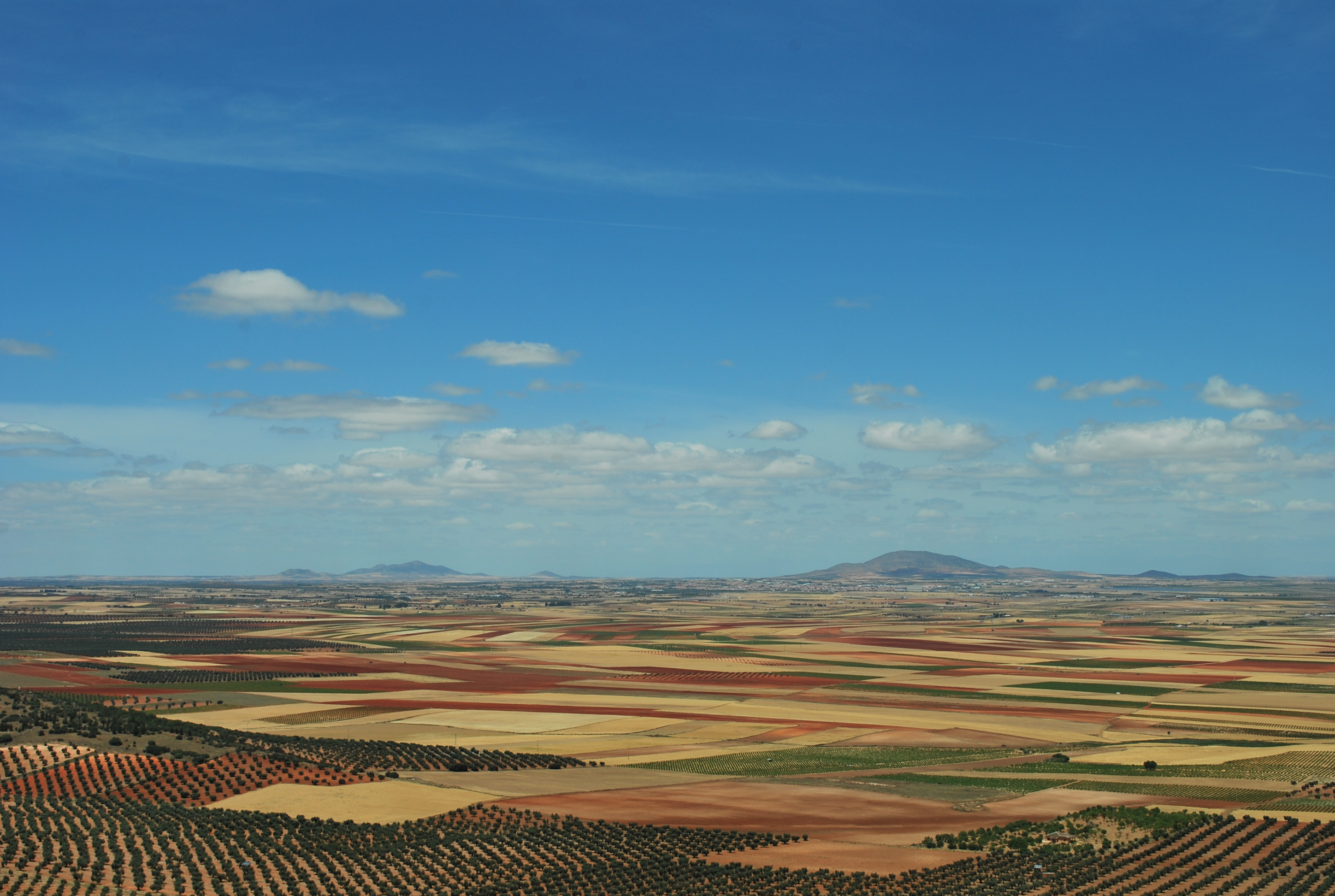 Los Yébenes, provincia de Toledo, Castilla-La Mancha, España.